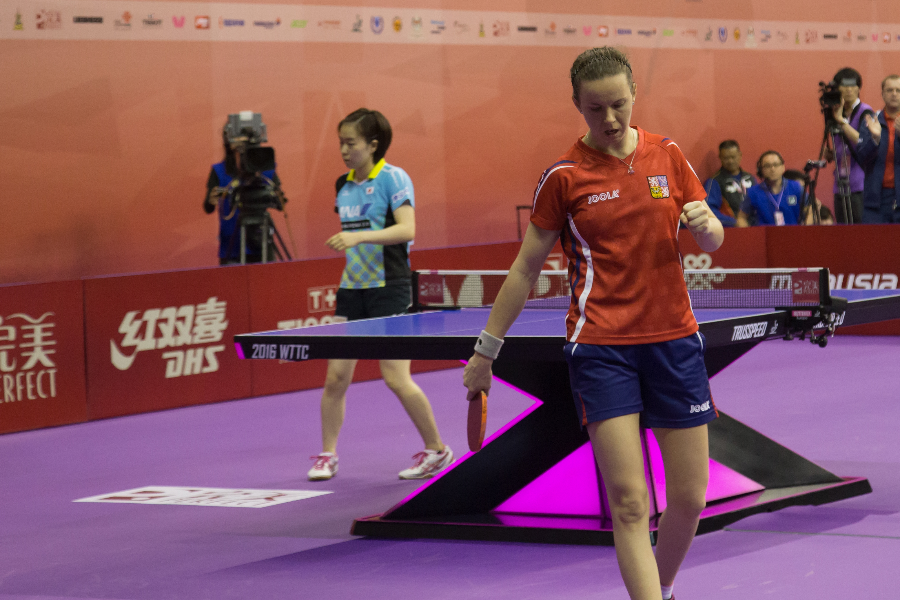 Iveta Vacenovská, Kasumi Ishikawa, WTTC2016